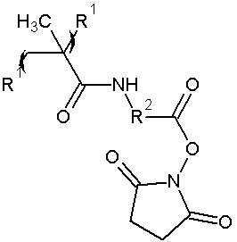 Polímero bioeficaz de hierro